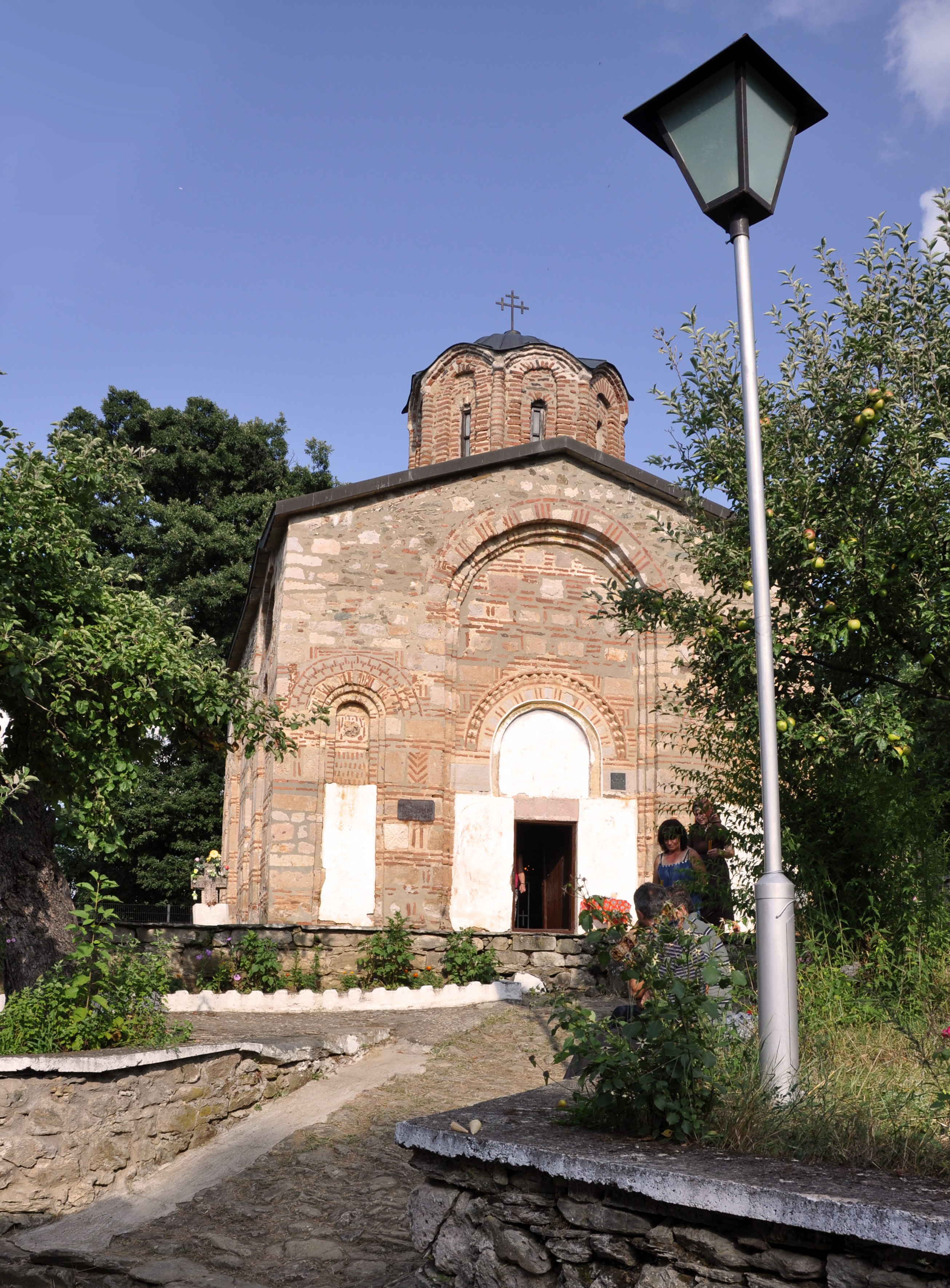 Црква свети Никола село Псача